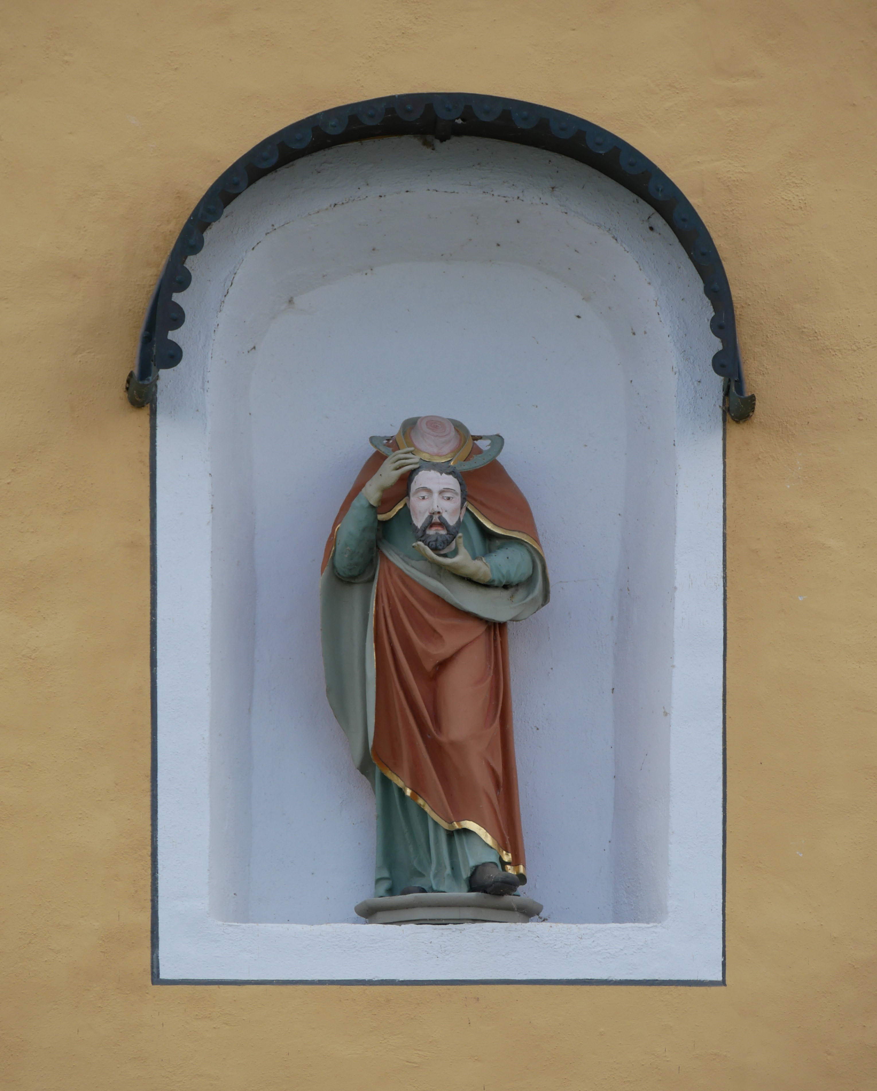 Dießen am Ammersee, St. Alban 4: Katholische Filialkirche St. Alban. Detail: Statue des Hl.Alban an der Ost-Außenseite der Kirche